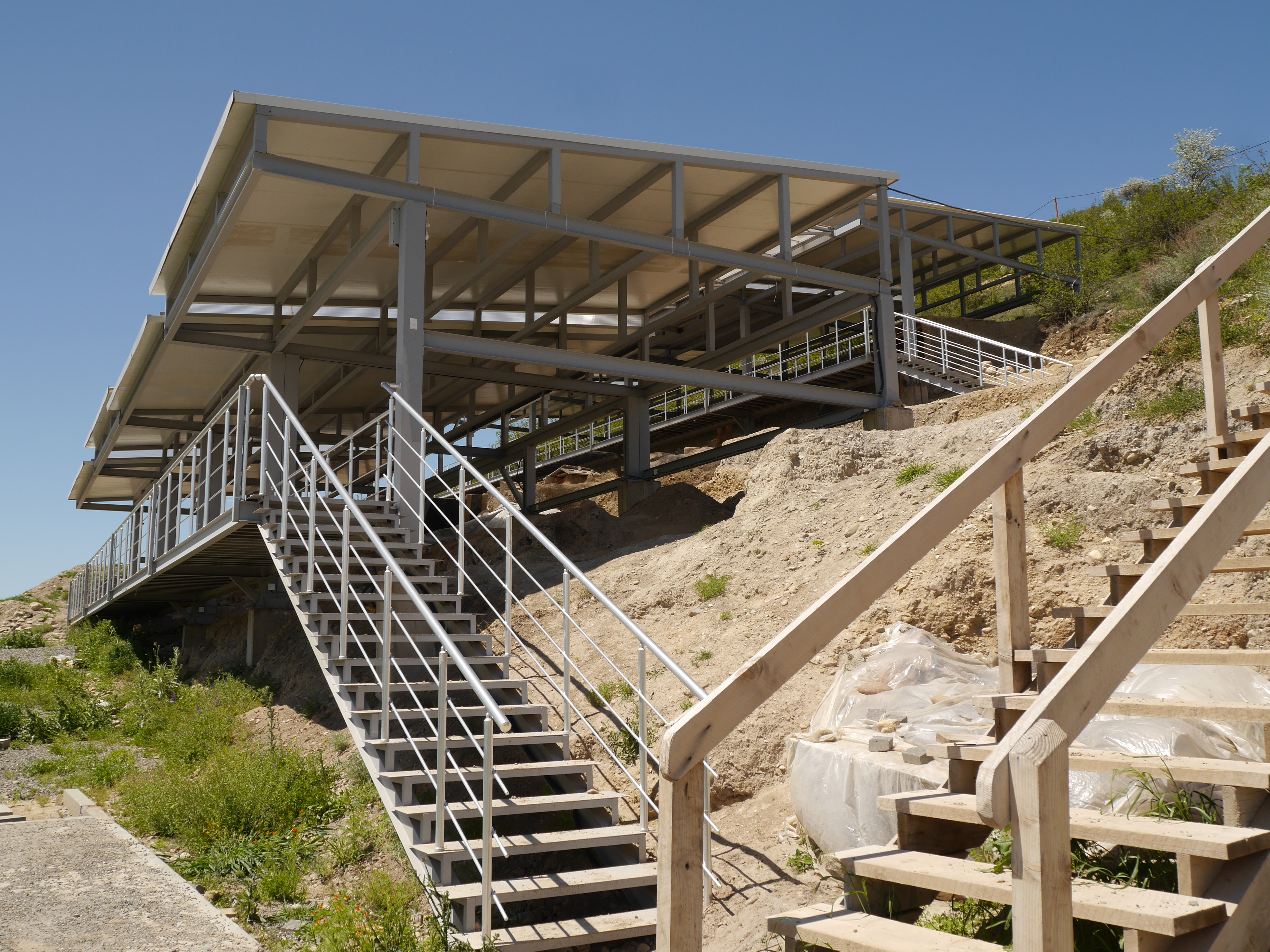 გრაკლიანი გორა